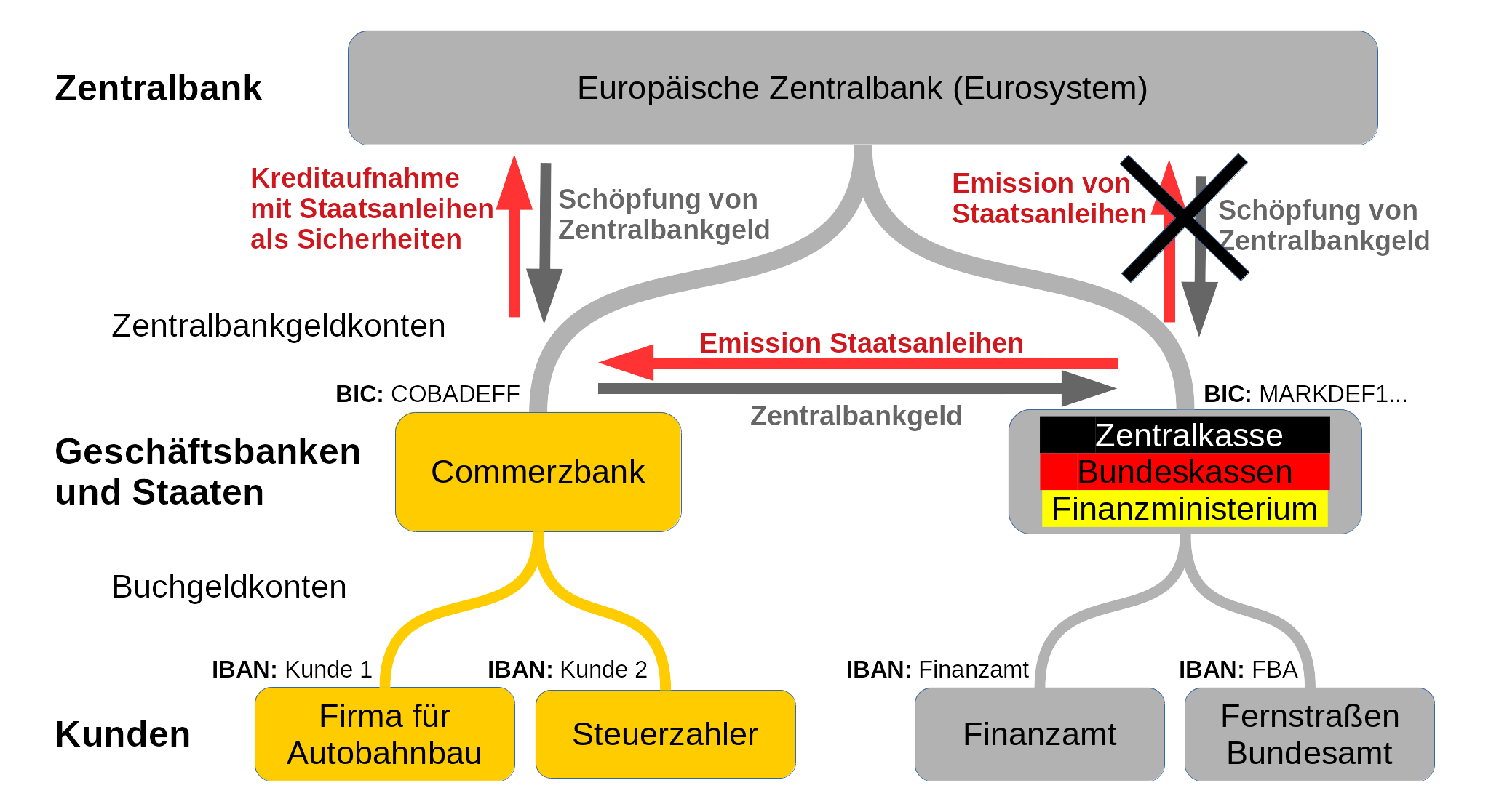 Bankenhierarchie mit Staat; Beziehungen der Verbindlichkeiten bei Emission von Staatsanleihen; Verbot der Staatsfinanzierung durch die Zentralbank.